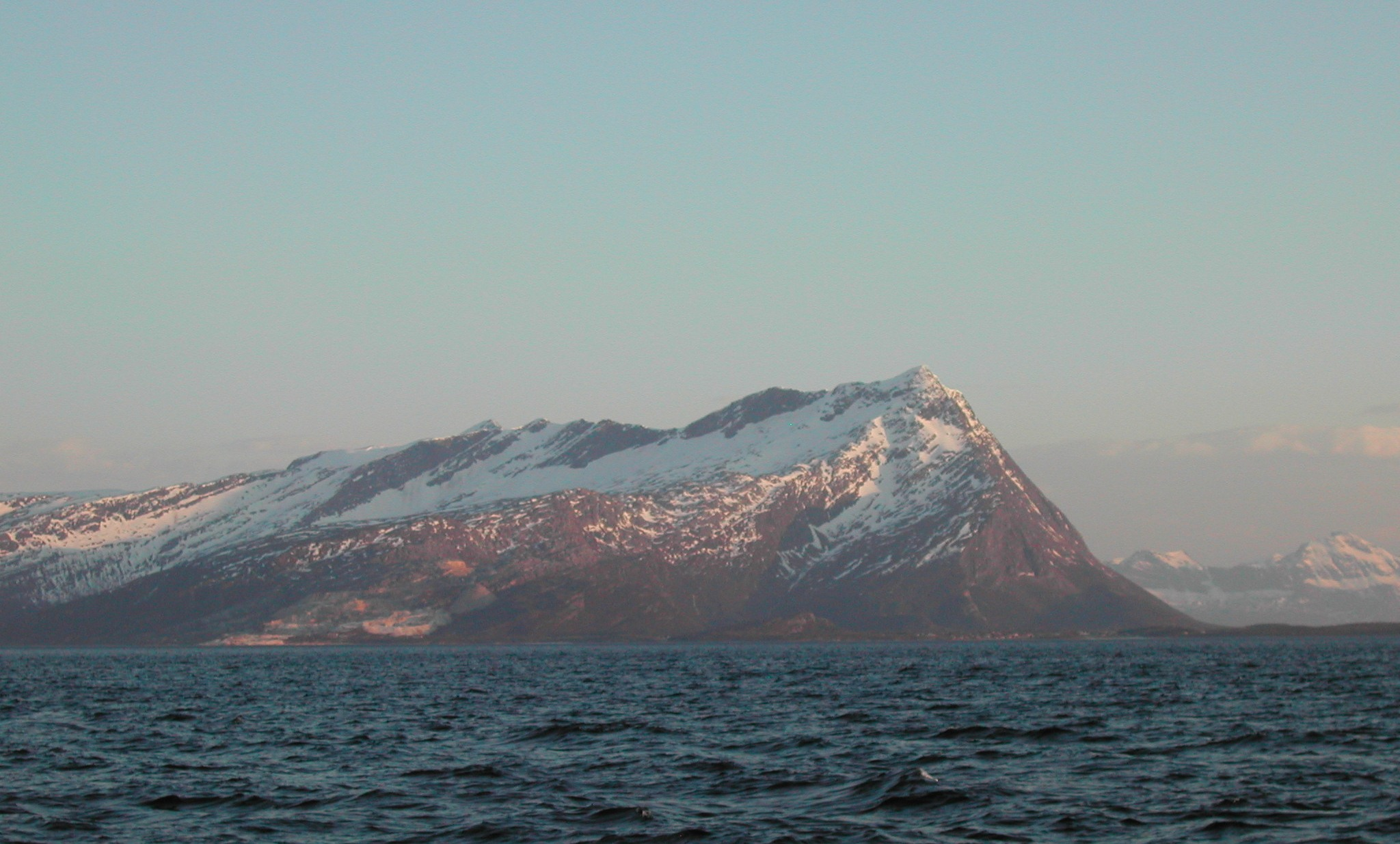 Sandhornøya